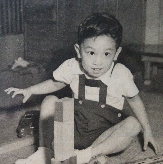 根本健